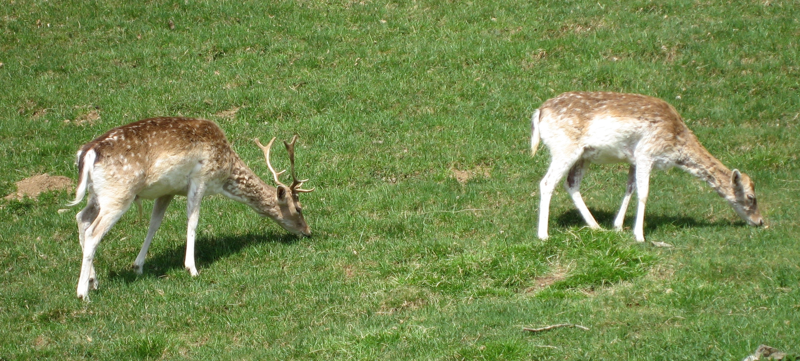 Dama dama in Parc de Merlet (Daim) Map: 45° 54' 26" N 6° 49' 2" E